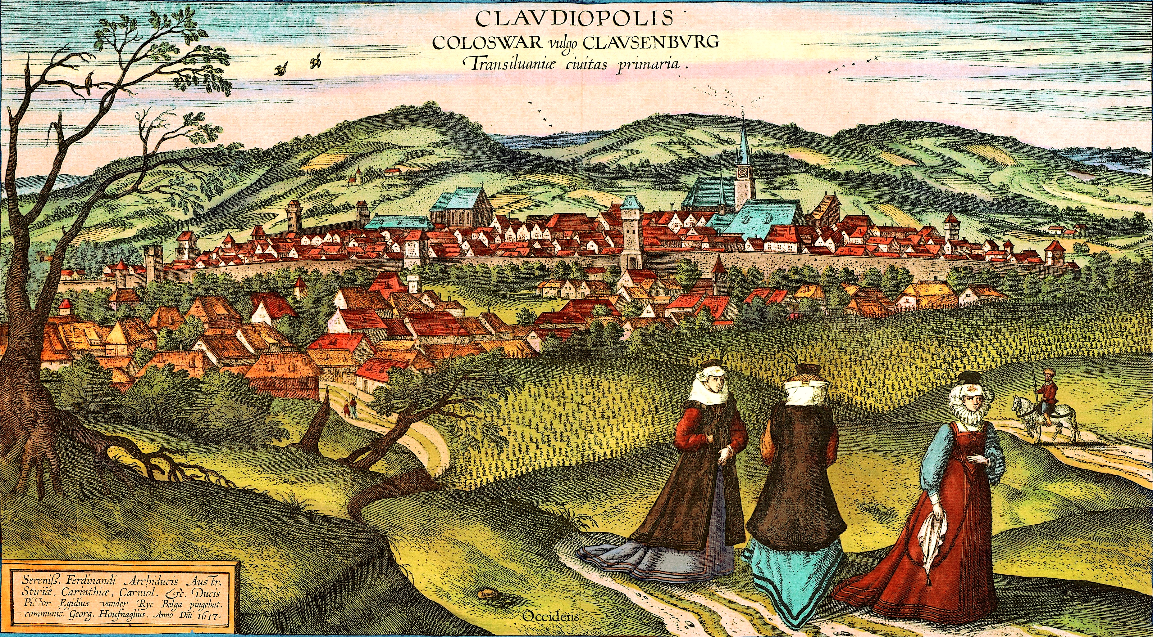 Kolozsvár Braun Hogenberg VI 41 b